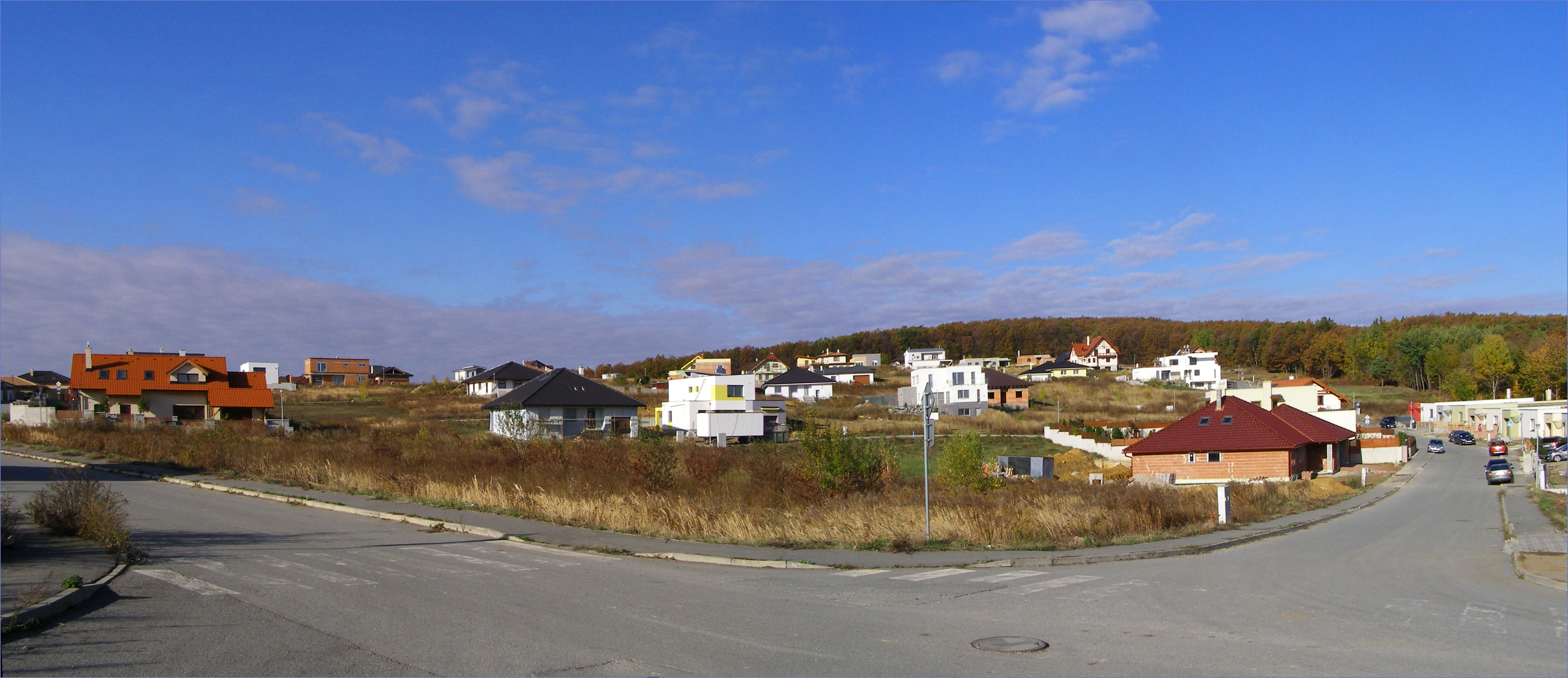 Vilky